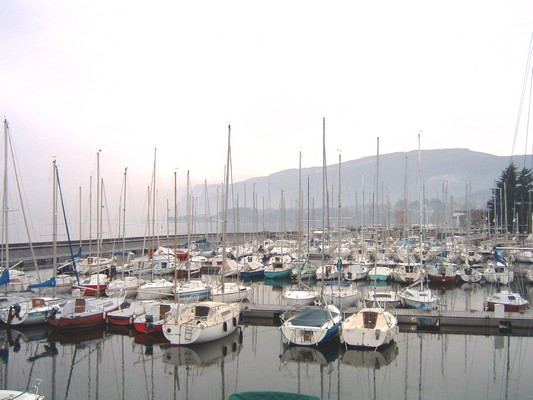 Le port de la ville d'Aix-les-Bains en France dans le département de la Savoie.